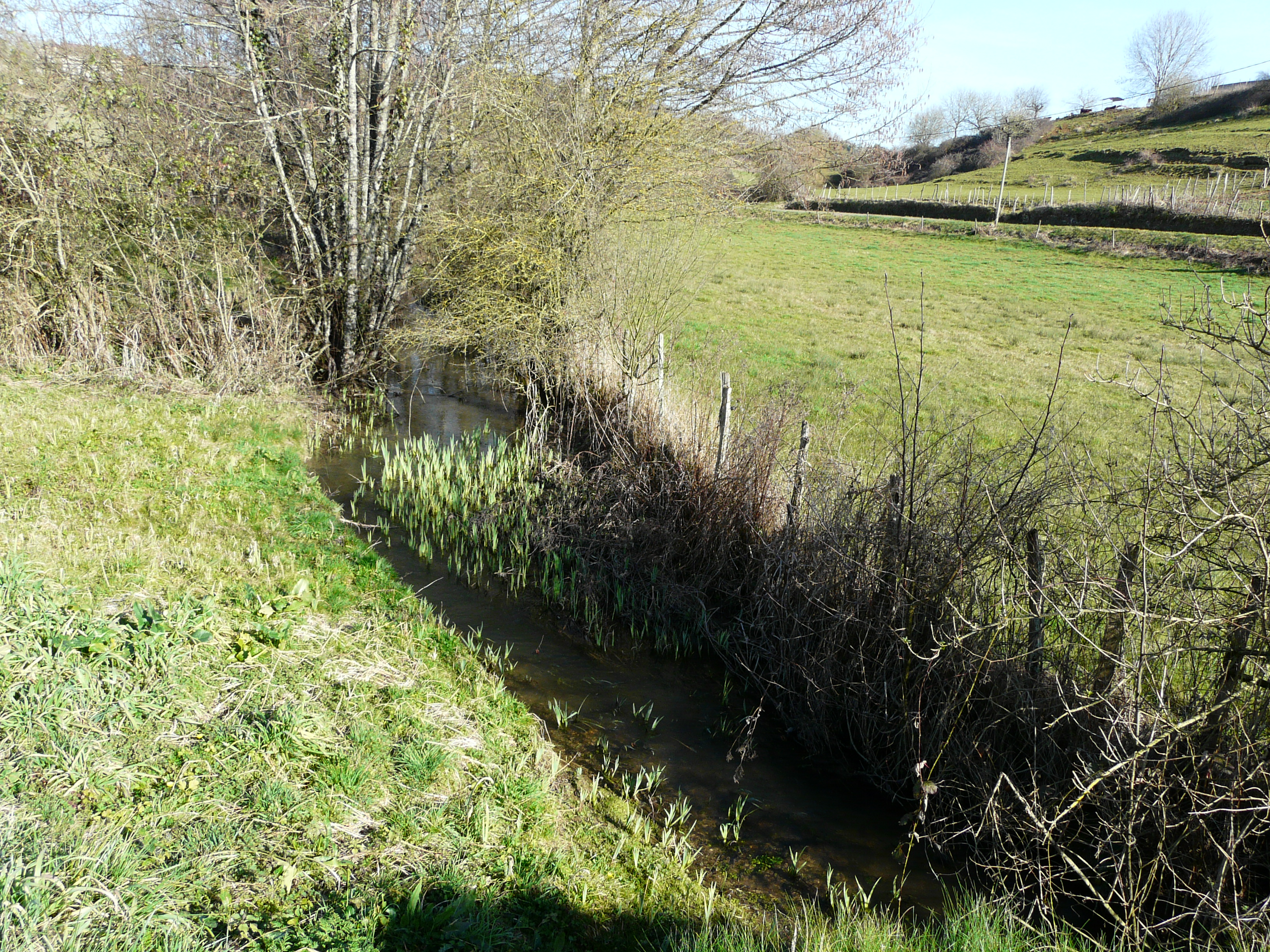 La Soue au lieu-dit le Maine, entre Granges-d'Ans à gauche et Sainte-Orse à droite ; Dordogne, France. Vue prise en direction de l'amont.